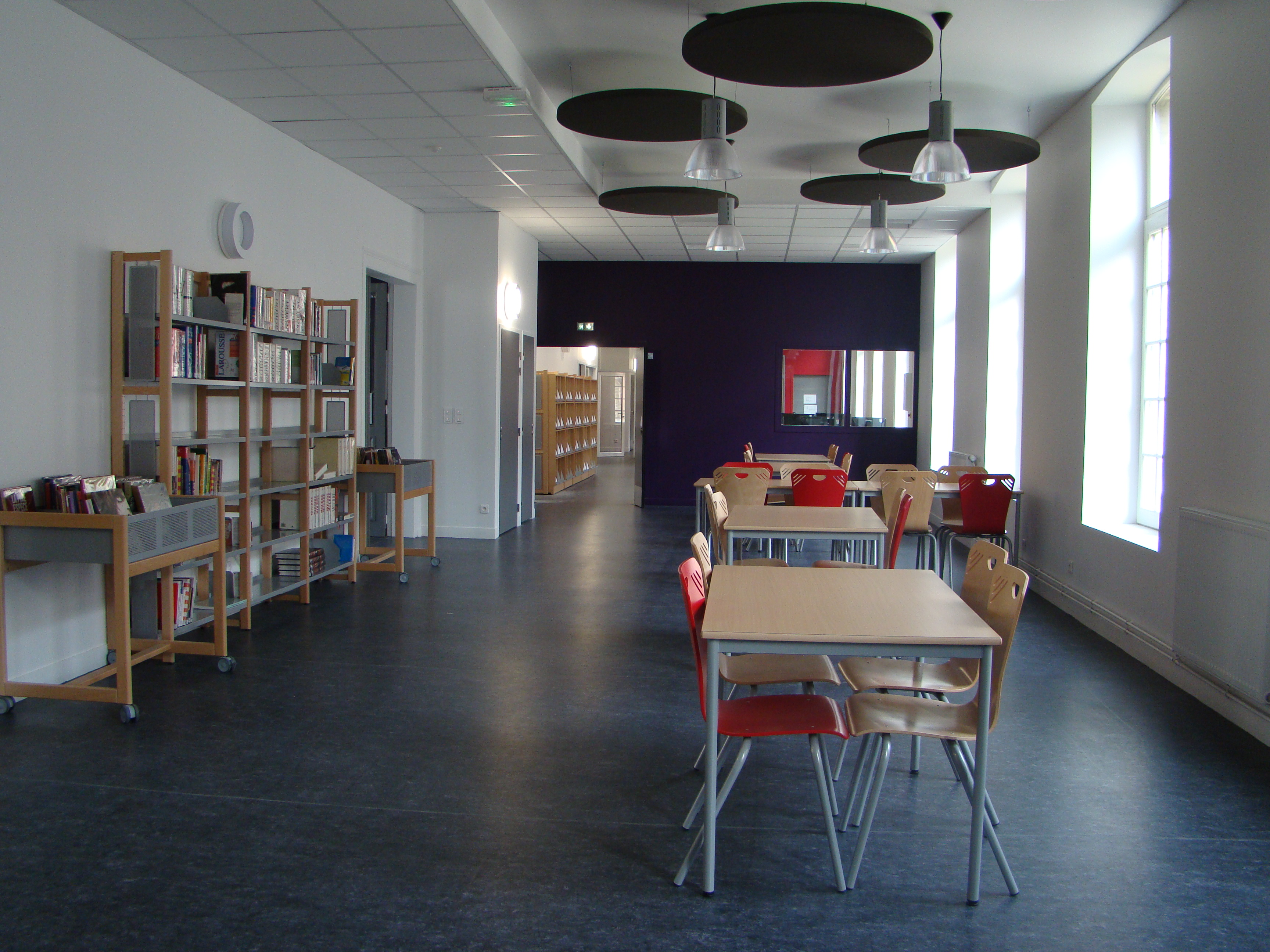 Le nouveau CDI du lycée François 1er inauguré au printemps 2016